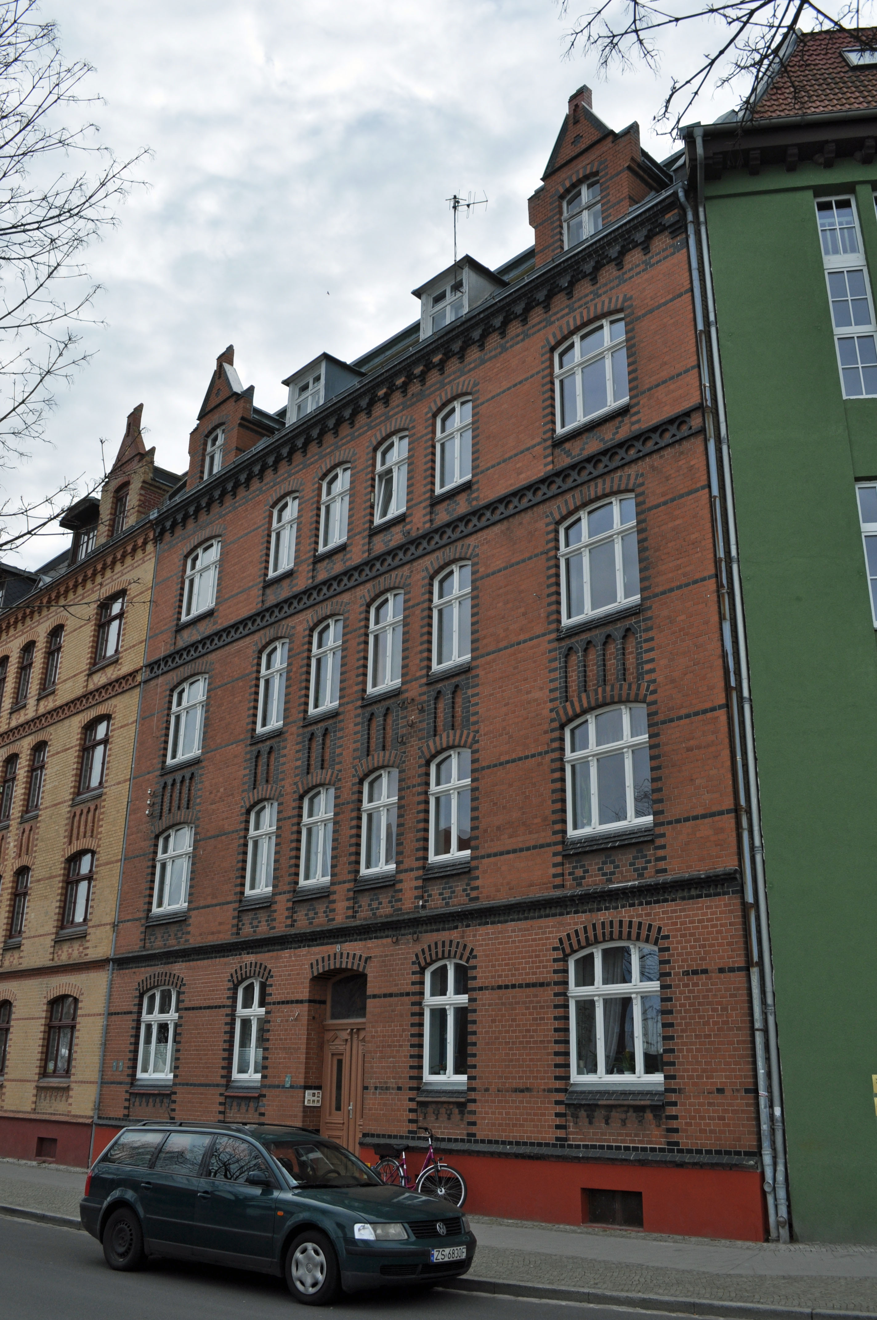 Gebäude bzw. Gebäudedetail in Stralsund. Straße und Hausnummer siehe Dateiname.